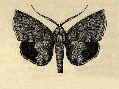 Gonodontodes chionosticta